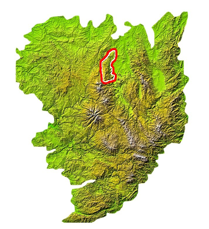 Emplacement de la chaîne des Puys sur la carte du Massif Central